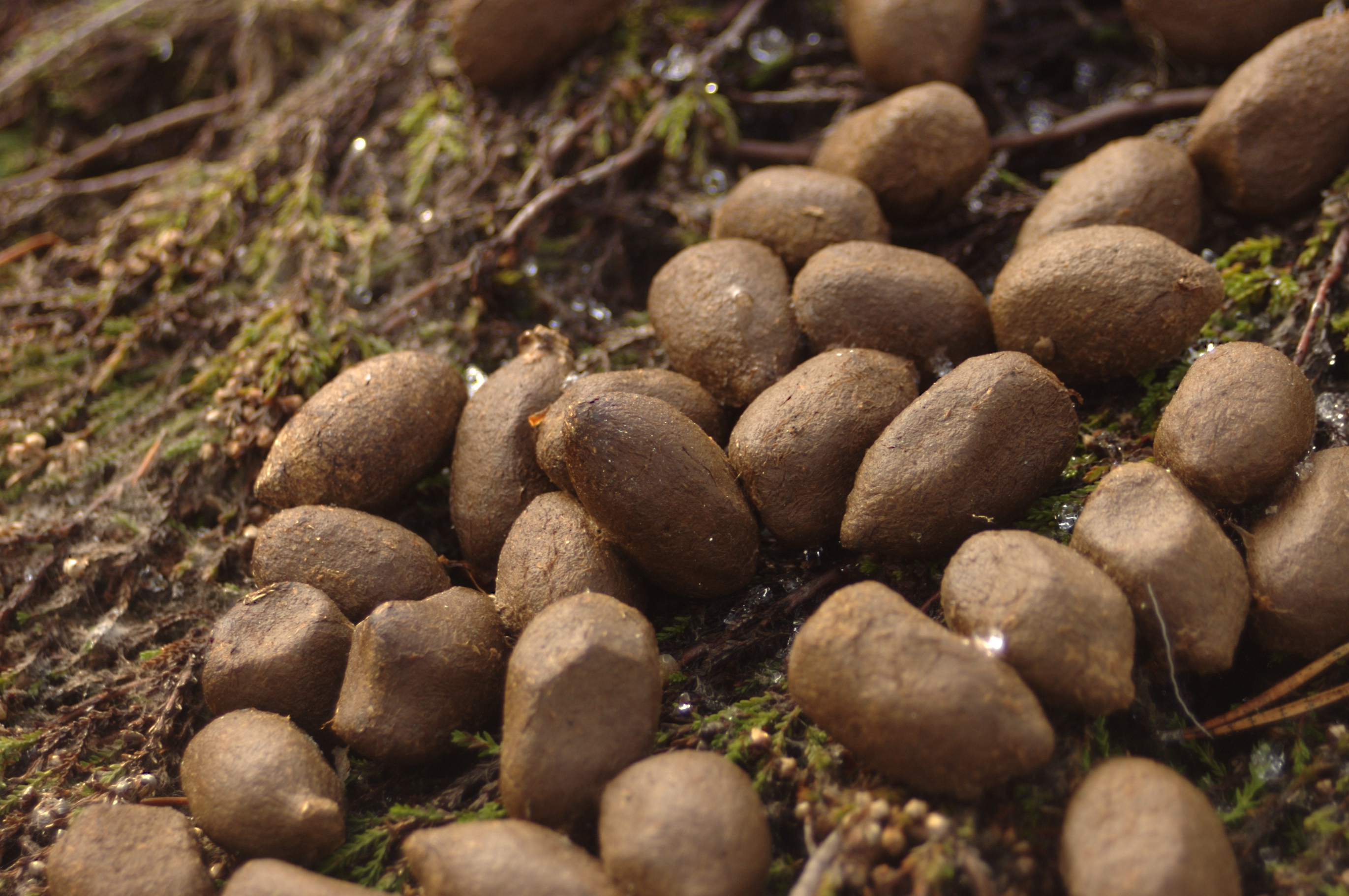 Elchlosung